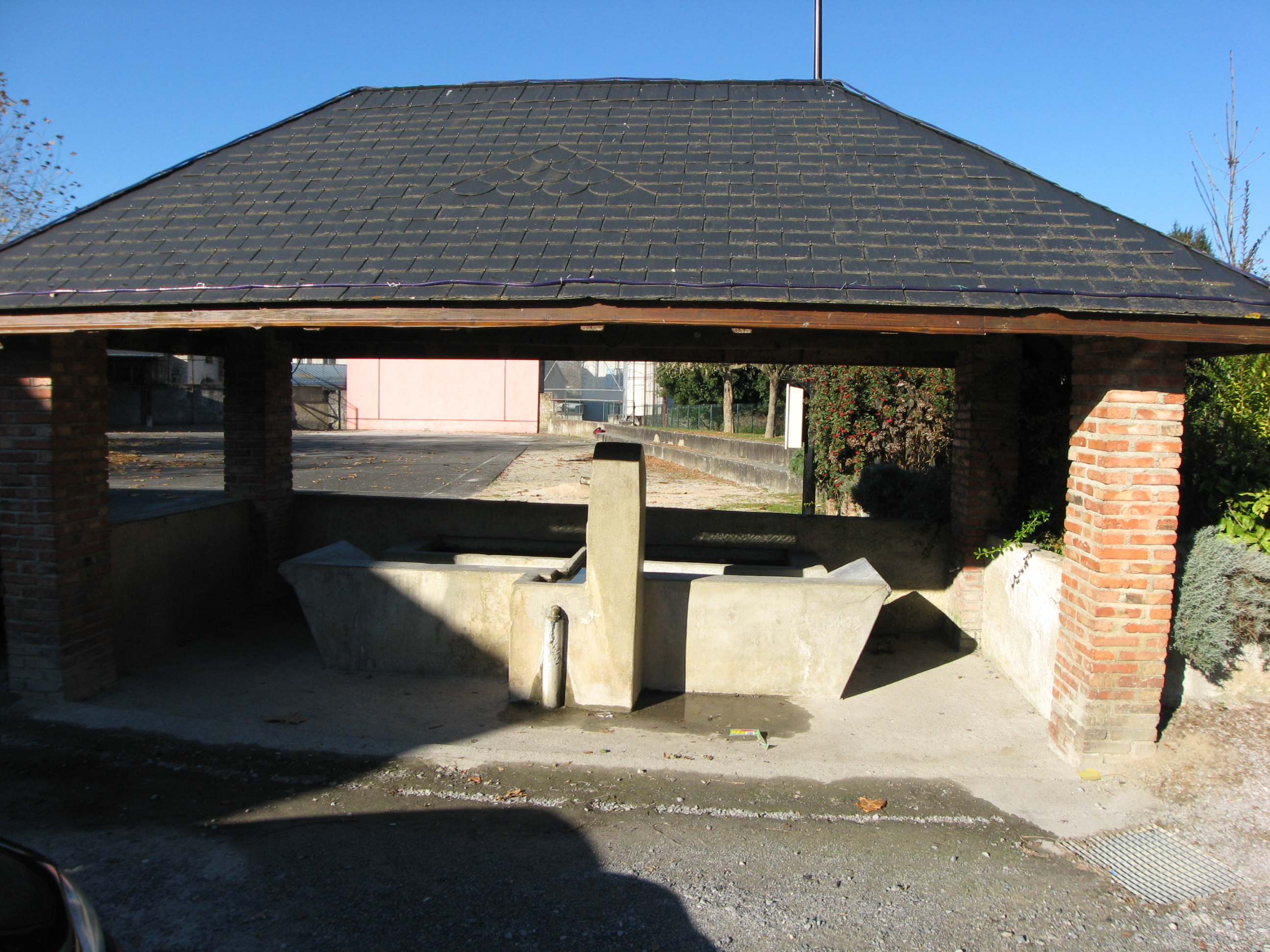 Ancien lavoir restauré à Ogeu-les-Bains (Pyrénées-Atlantiques) (Pyrénées).